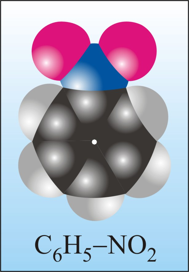 nitrobenzene model